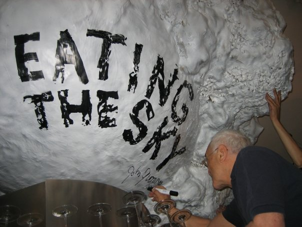 John Giorno al lavoro